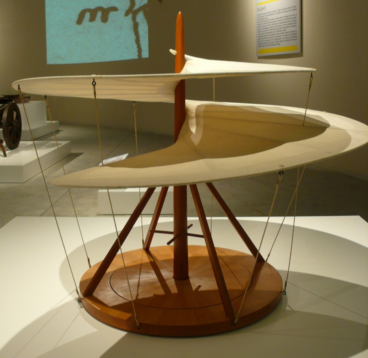 Il modello è' costituito da una base circolare fissa inscritta in una corona mobile, a sua volta collegata ad un albero di trasmissione verticale. Sull'albero è montata una struttura elicoidale rastremata verso l'alto, collegata tramite tiranti alla corona rotante della base Funzione Questo modello interpreta uno studio di macchina volante disegnata da Leonardo, che avrebbe sfruttato la forma elicoidale della vite per alzarsi. Come Leonardo scrive nella nota che accompagna il disegno, la vite se "voltata con prestezza, si fa la femmina nell'aria e monterà in alto". Modalità d'uso Quattro uomini avrebbero dovuto spingere, correndo sulla base, quattro sbarre collegate all'albero di trasmissione. La stuttura elicoidale si sarebbe così messa in moto, avvitandosi nell'aria. Leonardo intuisce e disegna un prototipo di elica, che non avrebbe potuto però funzionare visto il peso teorico della macchina e l'energia insufficiente prodotta dai quattro uomini. Notizie storico-critiche Lo studio di vite aerea è stato impropriamente collegato all'elicottero. Leonardo concepisce una struttura molto simile all'elica, ispirandosi alle forme della natura e dando corpo alle sue osservazioni sulle caratteristiche dell'aria Nelle note che accompagnano il disegno specificha inoltre le misure della base (8 braccia fiorentine, circa cinque metri) e i materiali: legno, corda e tela di lino inamidata.